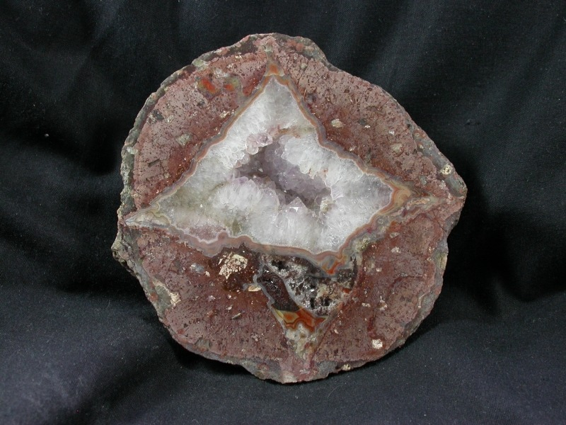 a thunderegg geode from Gehlberg, Germany